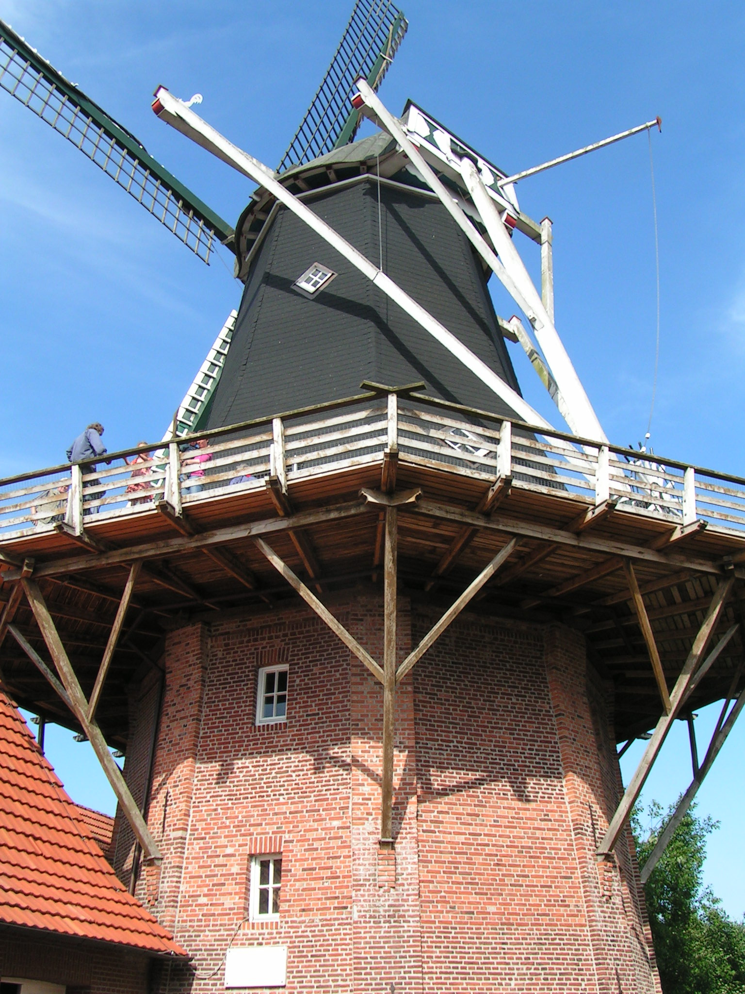 Kreutzmanns Mühle (Galerieholländer) in Werlte